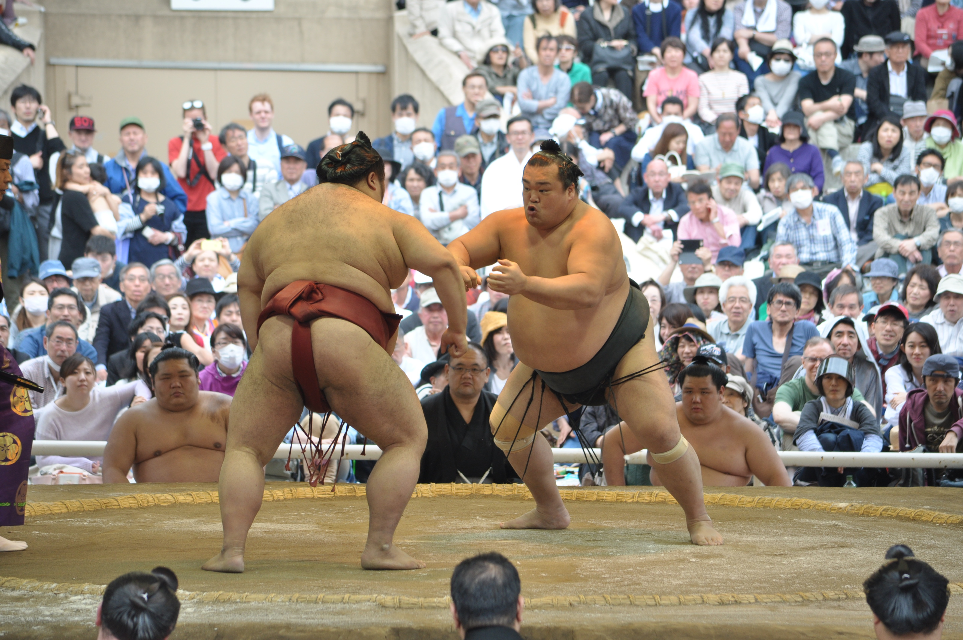 豊響 隆太